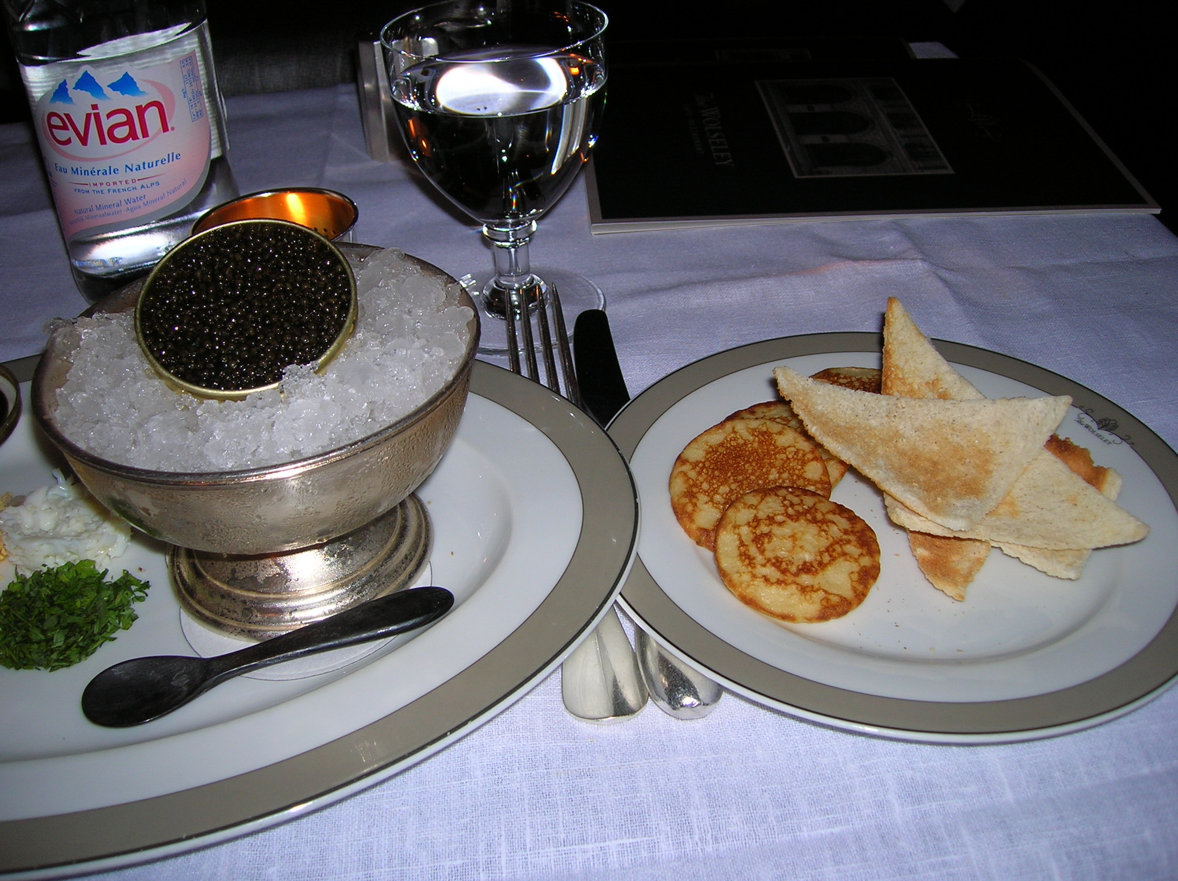 קוויאר בלוגה מוגש עם בליני ושמנת חמוצה במסעדת וולזלי בלונדון